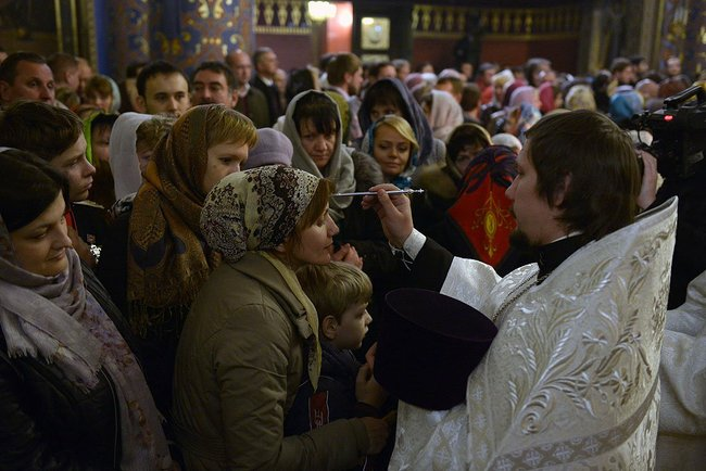 Присутствие В. В. Путина на праздничном рождественском богослужении в храме Нерукотворного Образа Христа Спасителя, построенном рядом с Олимпийским парком в Имеретинской низменности в Сочи.